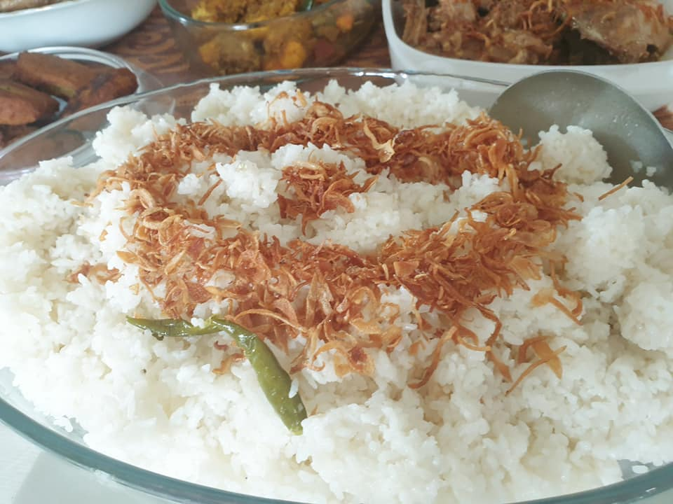 তুলশীমালা চালের পোলাও